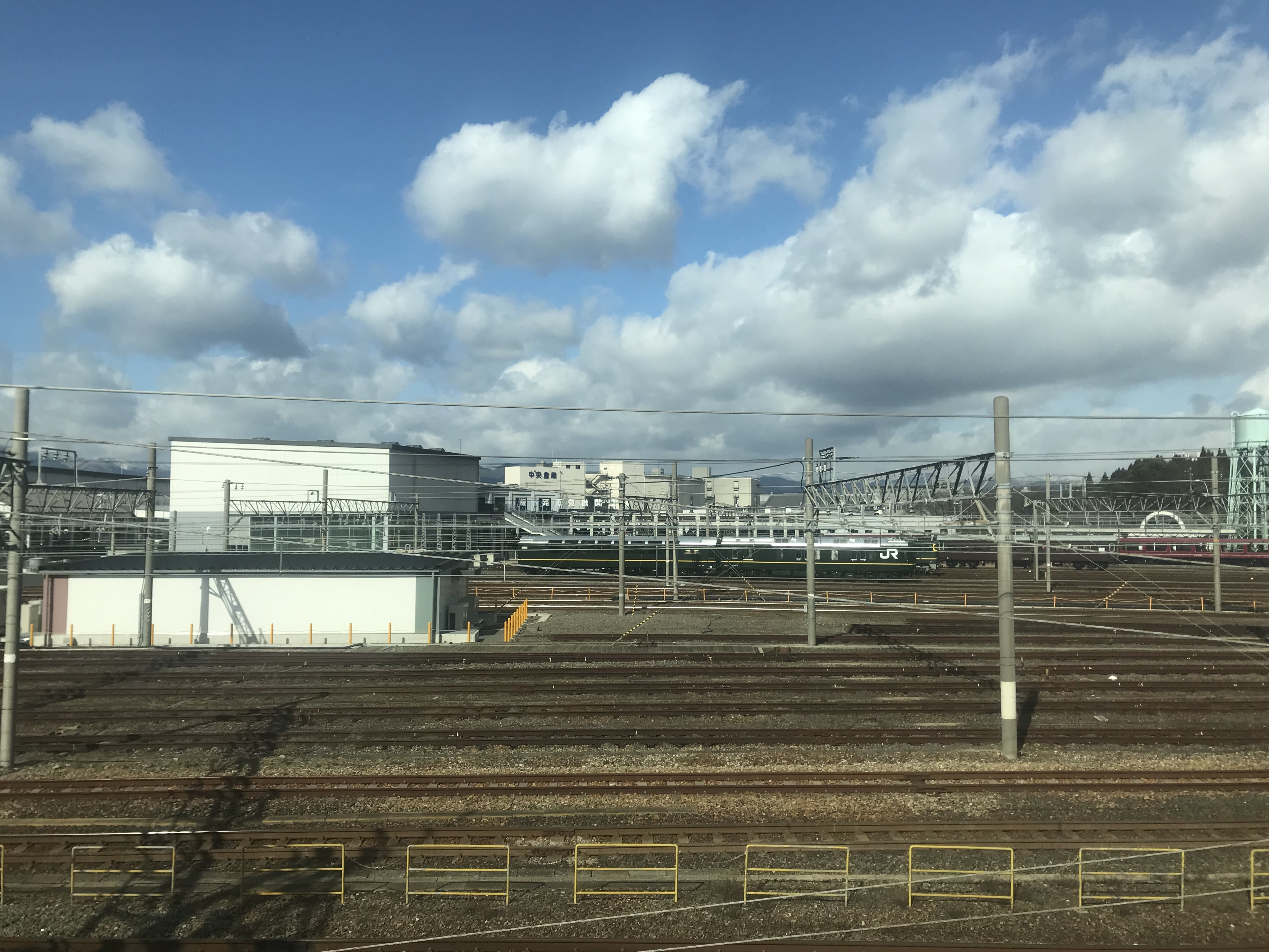 JR京都線の列車内より望む梅小路運転区